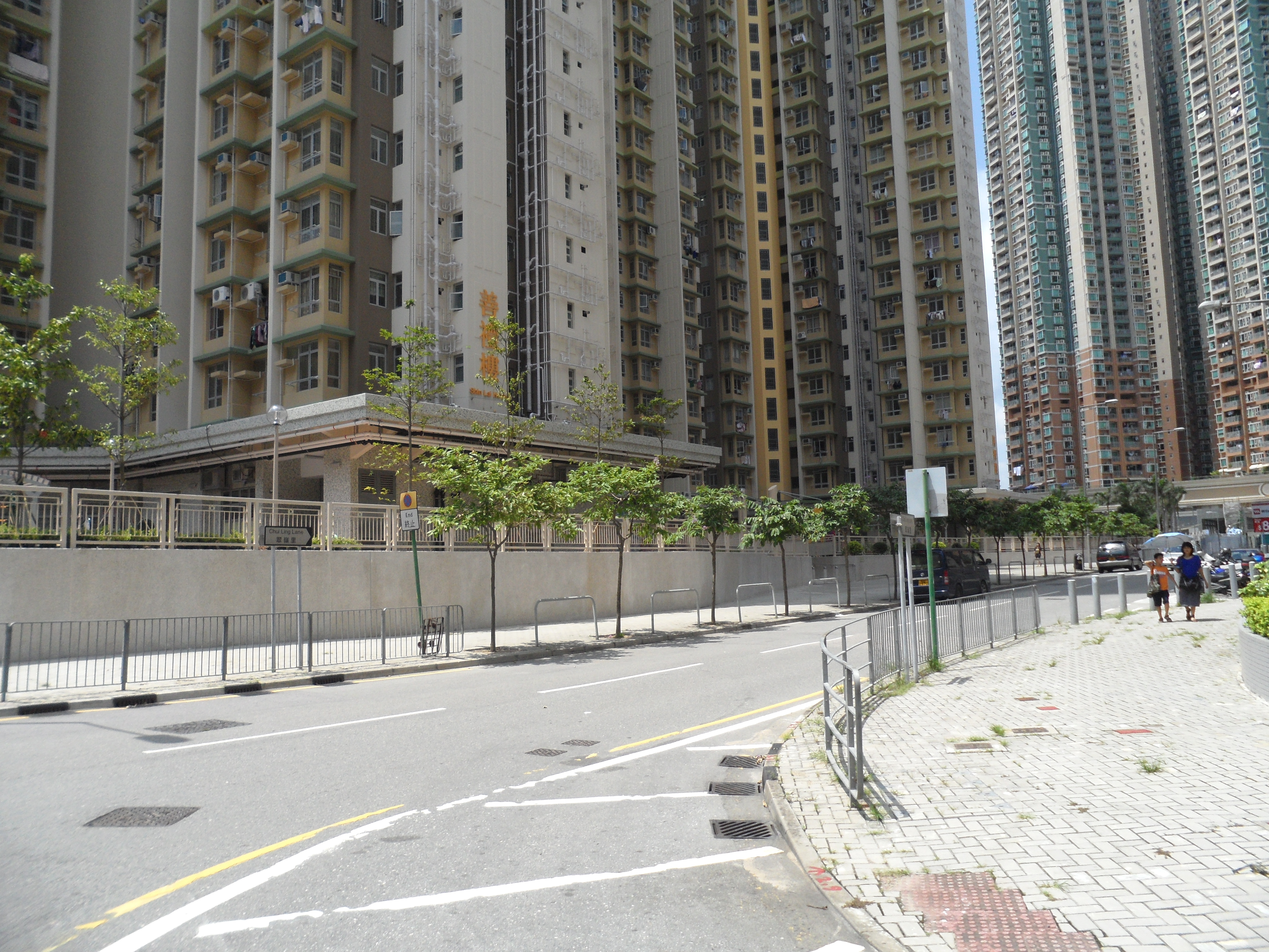 善明邨與翠嶺里的路口